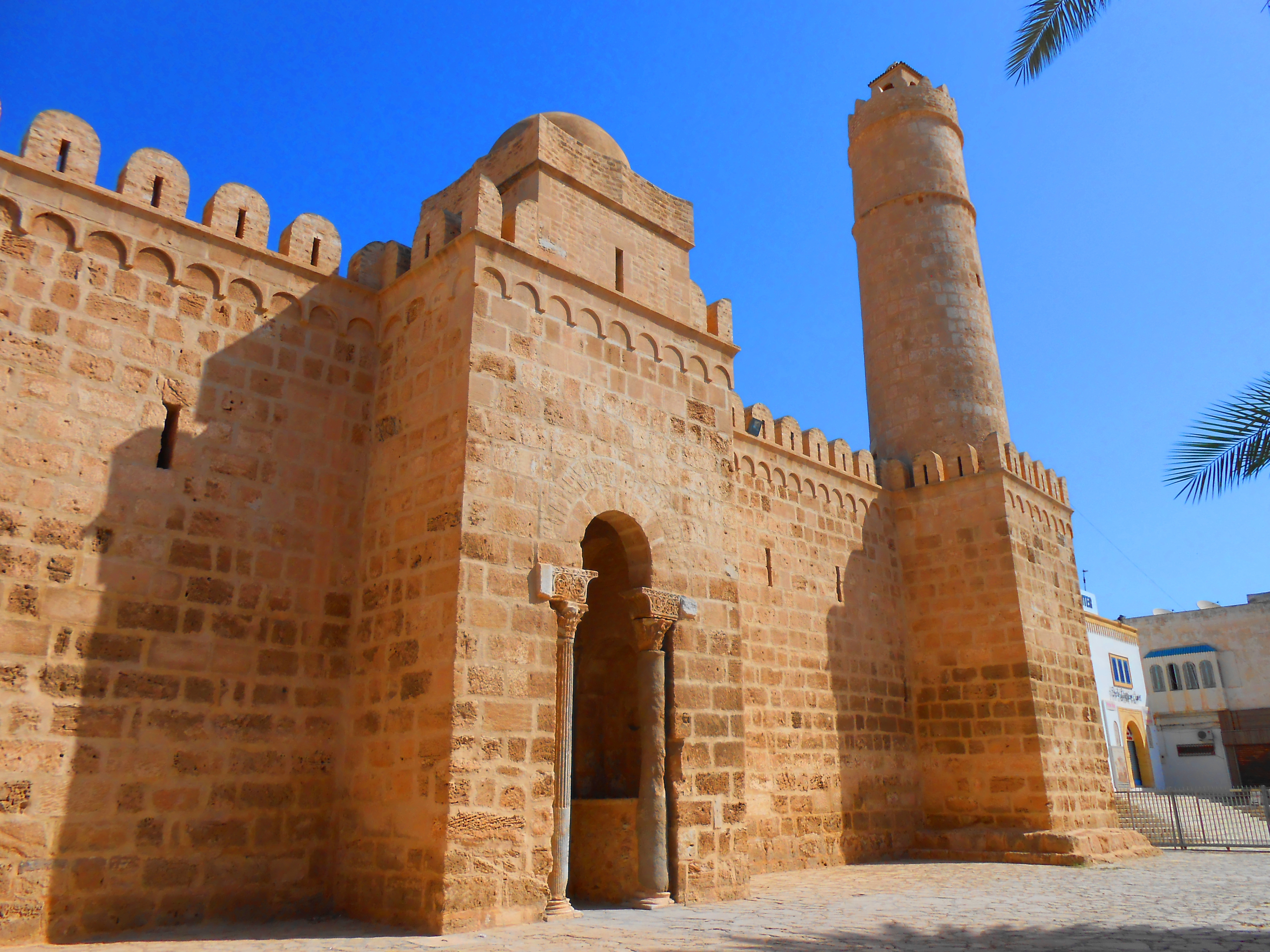 Extérieurs du ribat de Sousse